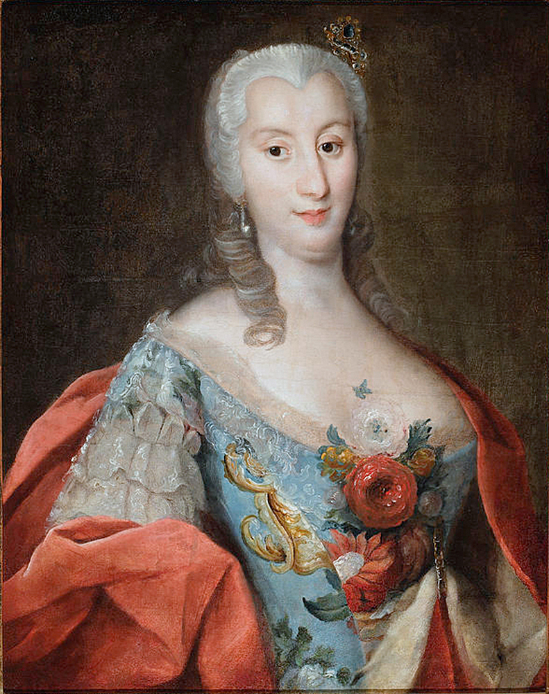 Беларуская (тарашкевіца): Партрэт Людвікі Ганараты Любамірскай (Ludvika Hanarata Lubamirskaja) з роду Пацеяў (Paciej)